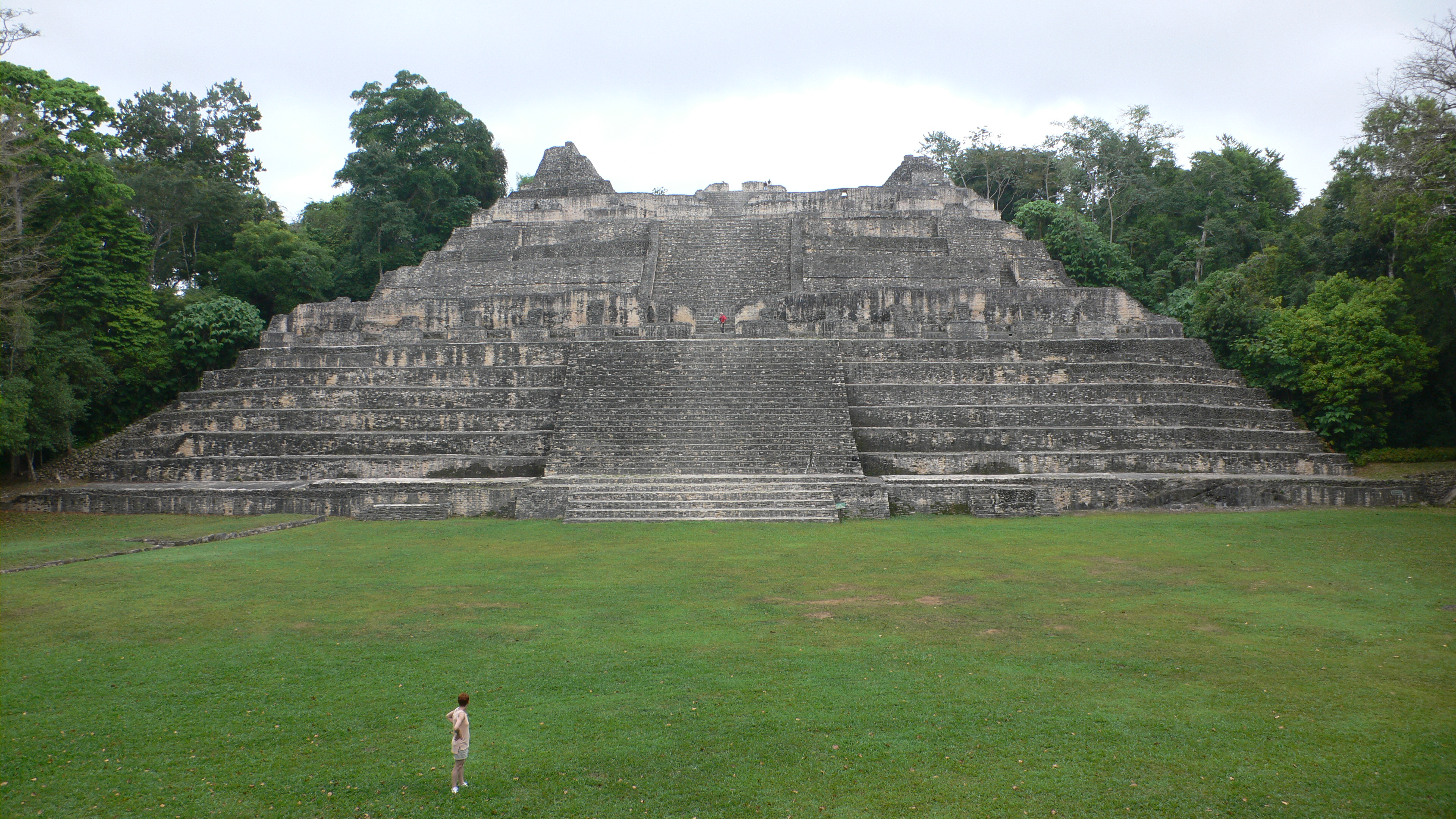 Caana Pyramid at Caracol, Belize